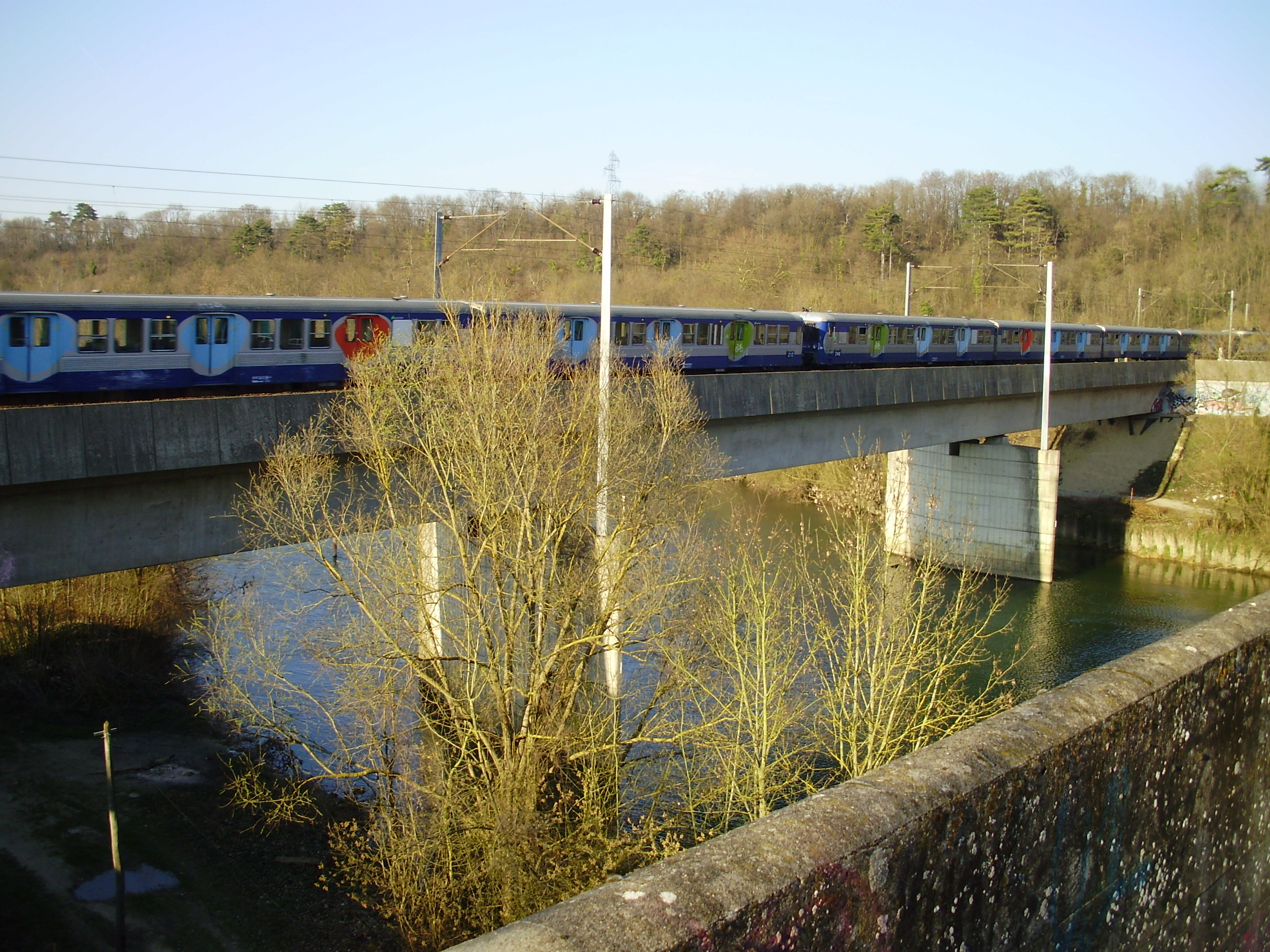 Viaduc de Chalifert, communes de Dampmart et Chalifert, Seine-et-Marne, France (vue depuis l'ancienne plate-forme avec une rame inox de banlieue)